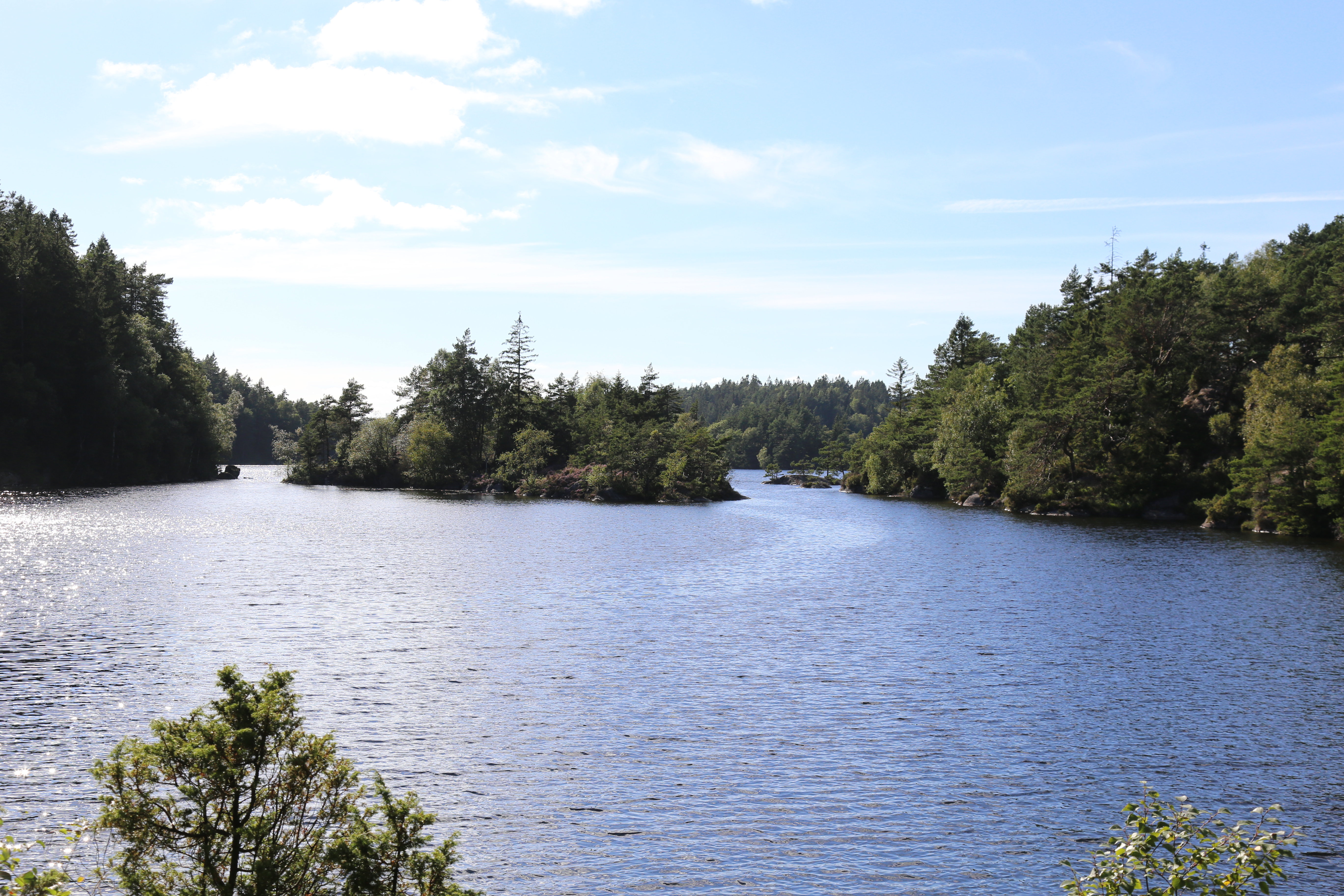 Stora Holmevatten i Stenungsunds kommun. Vy ut över sjön från dess östra vik.